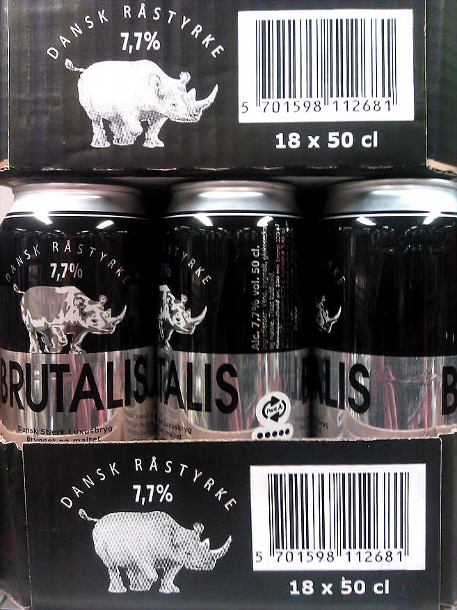 Brutalisøl, opkaldt efter næsehornet Brutalis, der engang boede i Givskud Zoo, Danmark